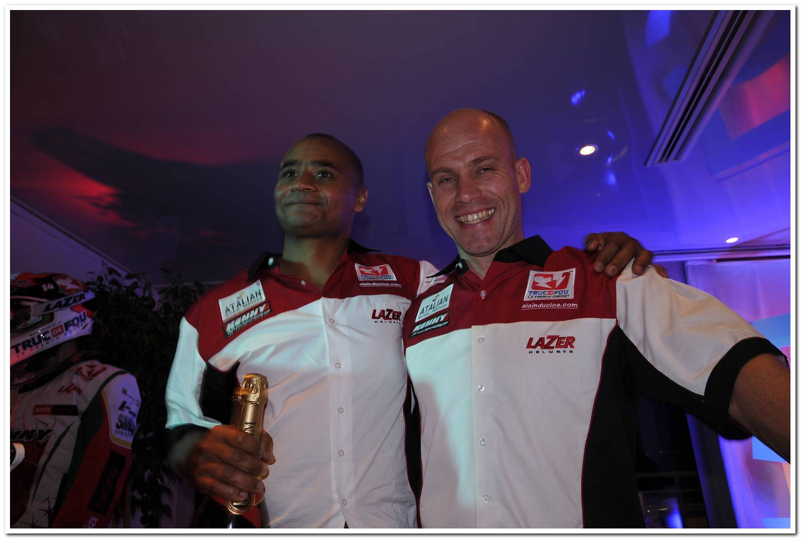 Alain Duclos et Arnaud Besnier